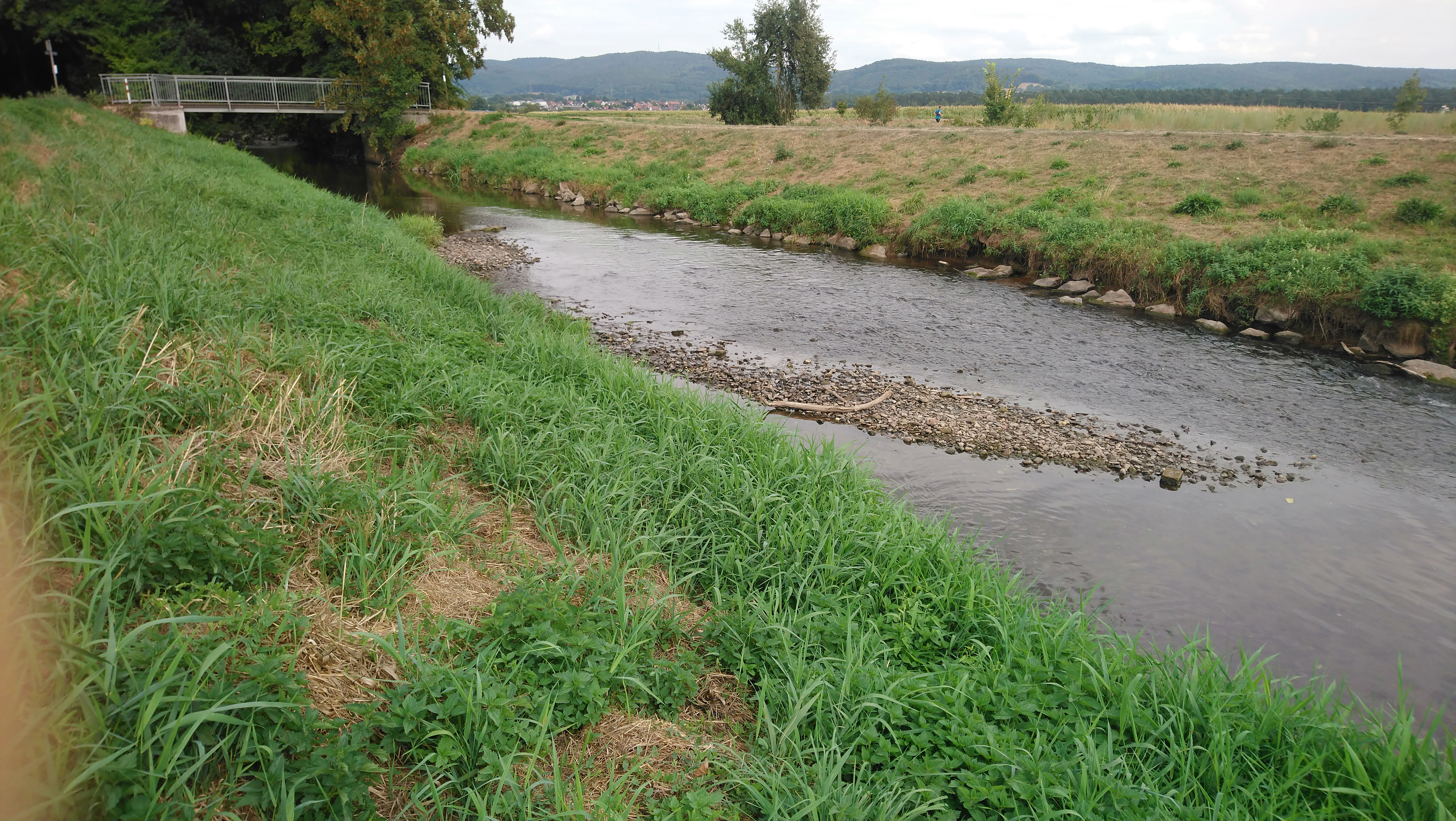 Die Kahl bei Niedrigwasser Nähe Alzenau